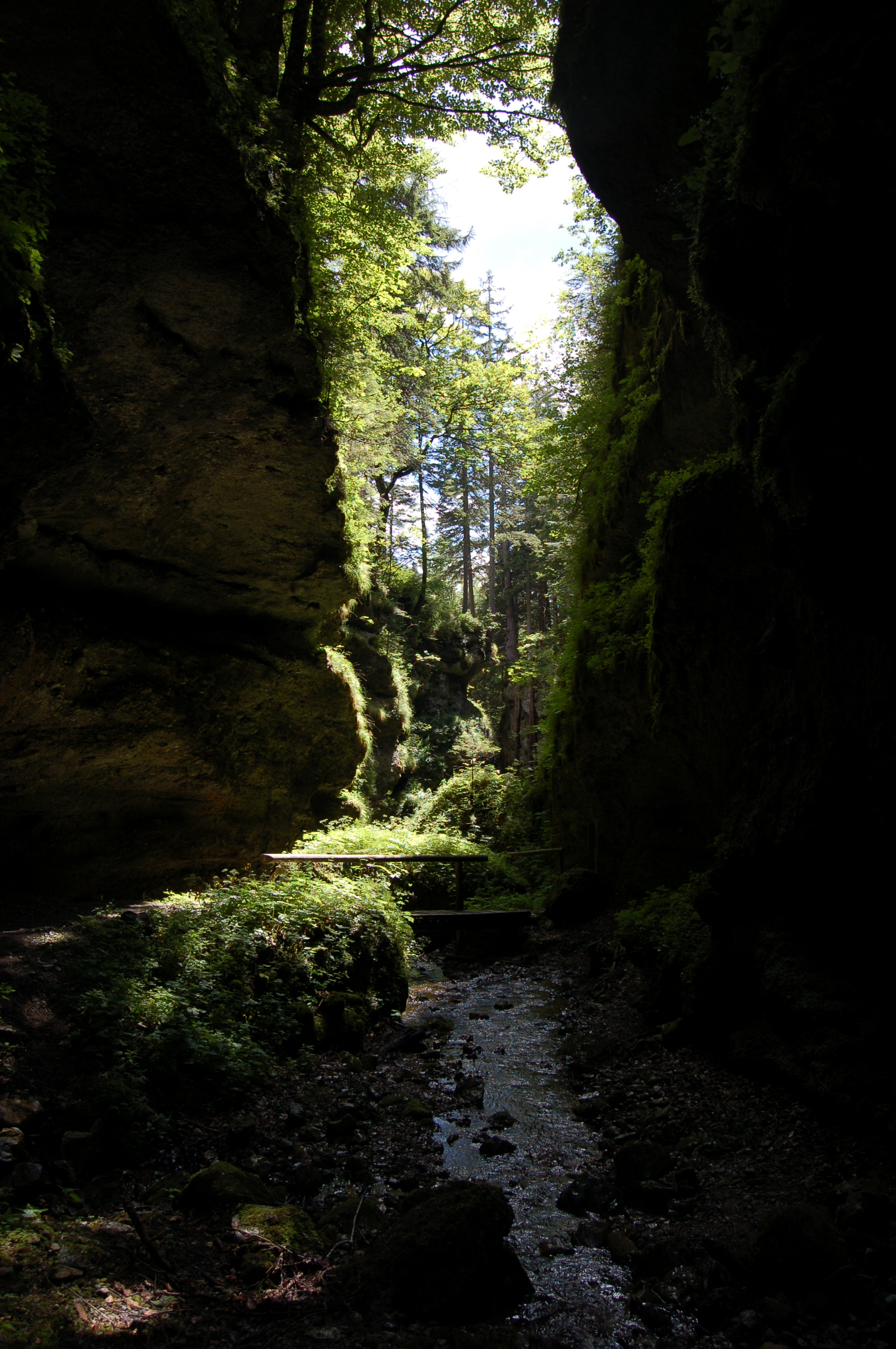 Marienklamm bei Tragöß Oberort, Steiermark This media shows the natural monument in Styria with the ID 378.